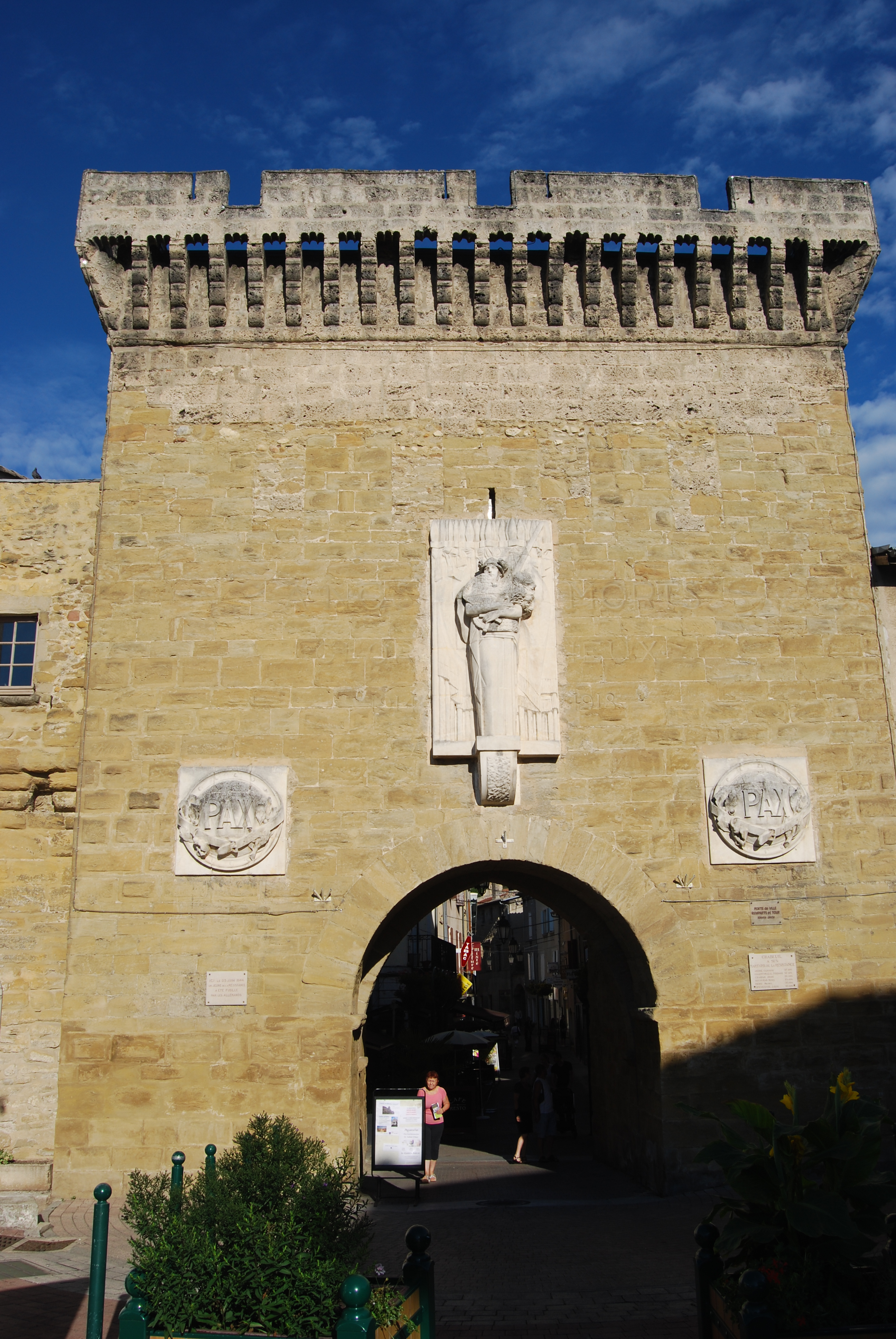 Vue générale de la porte de Chabeuil, Drôme.